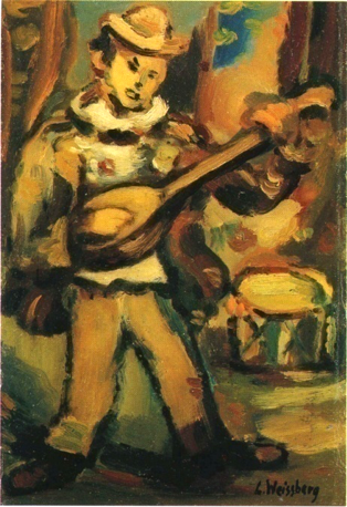 Tableau Clown musicien, de Léon Weissberg